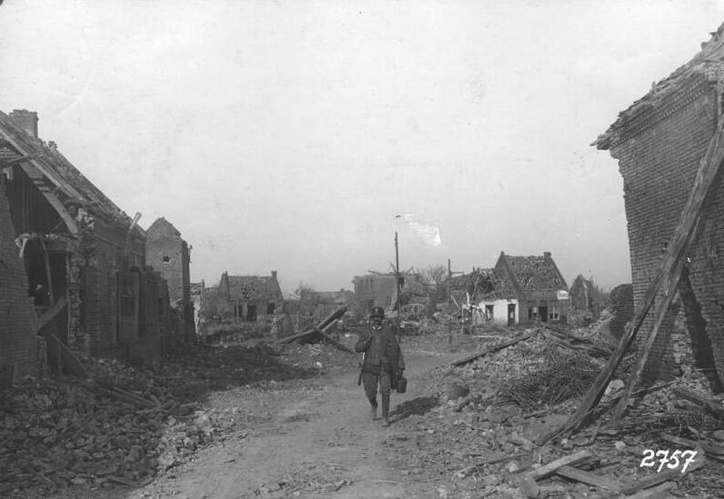 Vor der Arras-Lens-Front Ein unmittelbar im Kampfgebiet liegender, durch feindliches Feuer völlig zerstörter Ort.